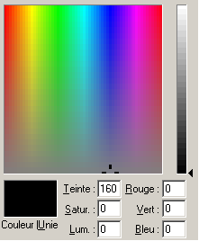 présentation de l'espace des couleurs suivant le repère HSL cf. mon article "Codage informatique des couleurs" [1]